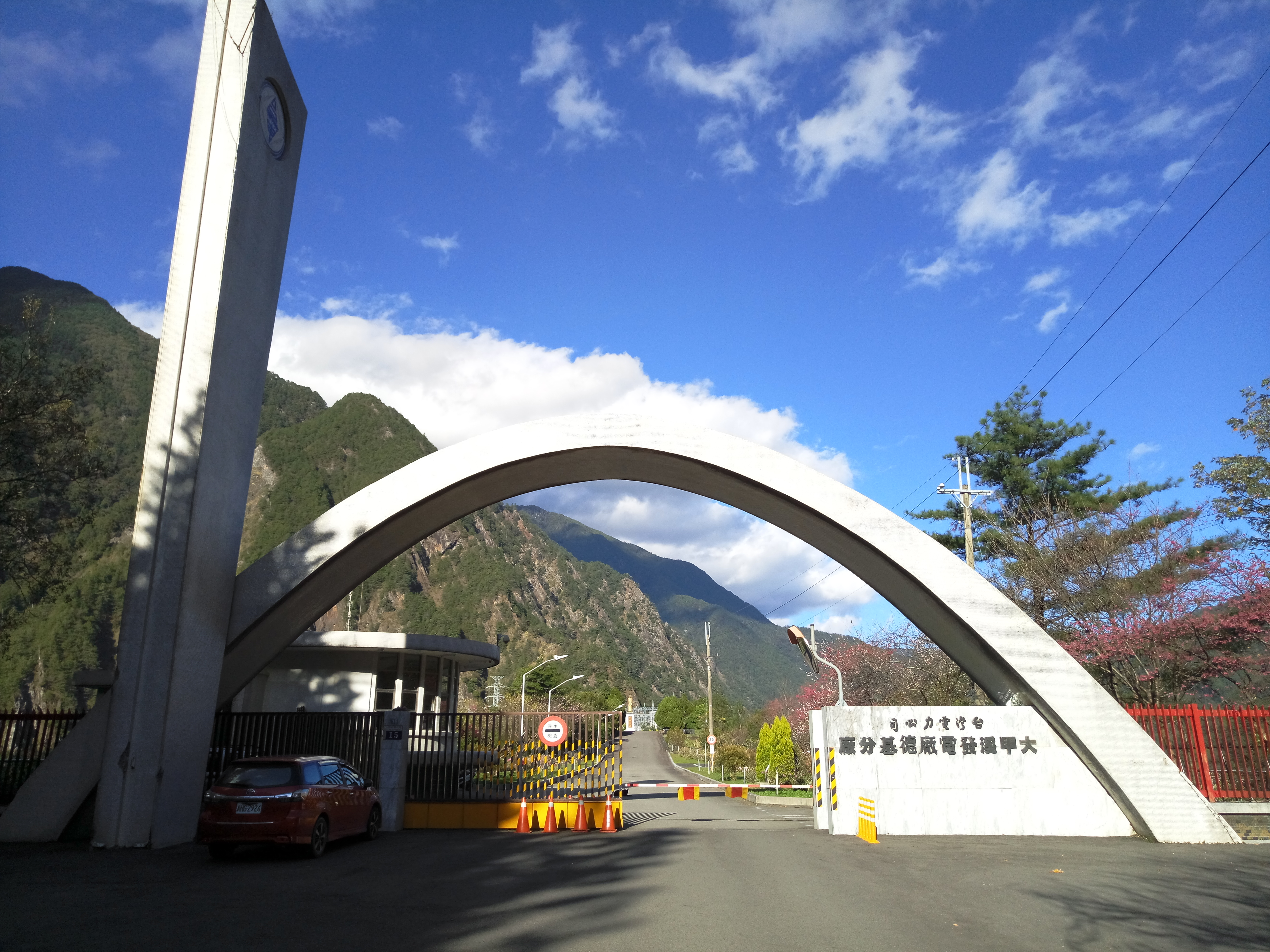 2017年1月台電大甲溪發電廠德基分廠大門狀況。